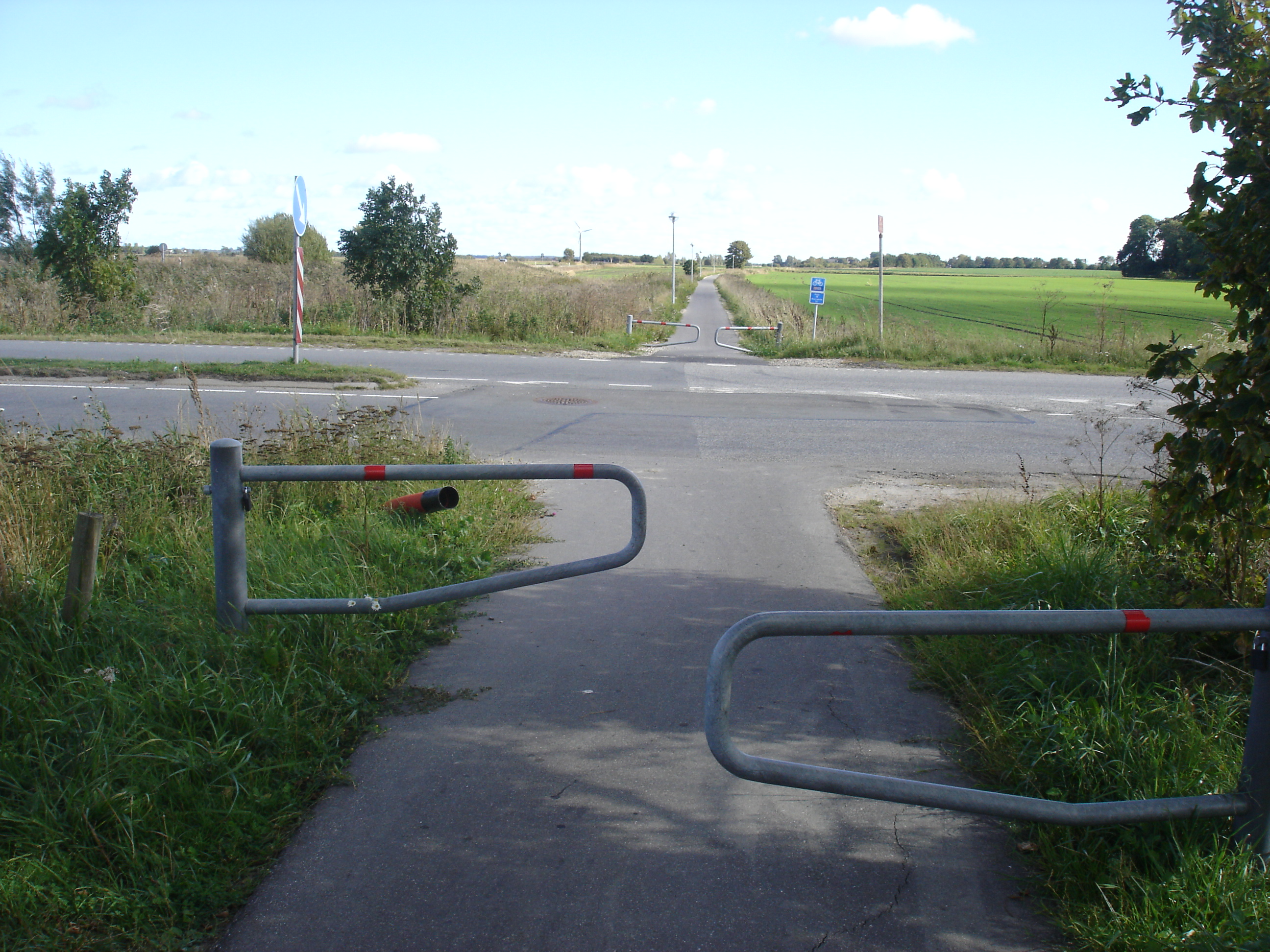 Limfjordsruten på Aalborg-Hadsund-banens tracé krydser Svinetruget - her lå Stranderholm trinbræt